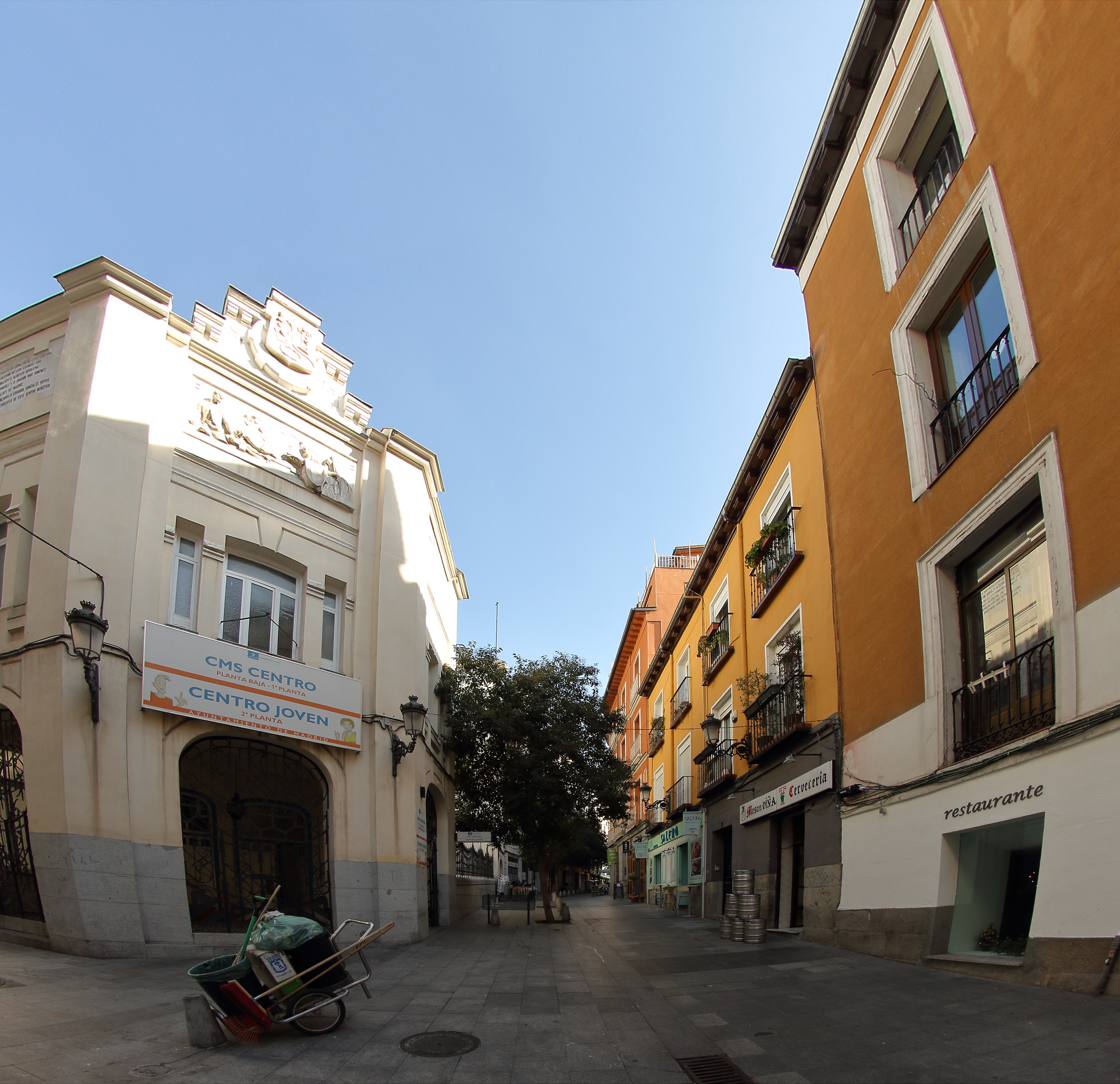 Calle Navas de Tolosa, interseción con calle Ternera